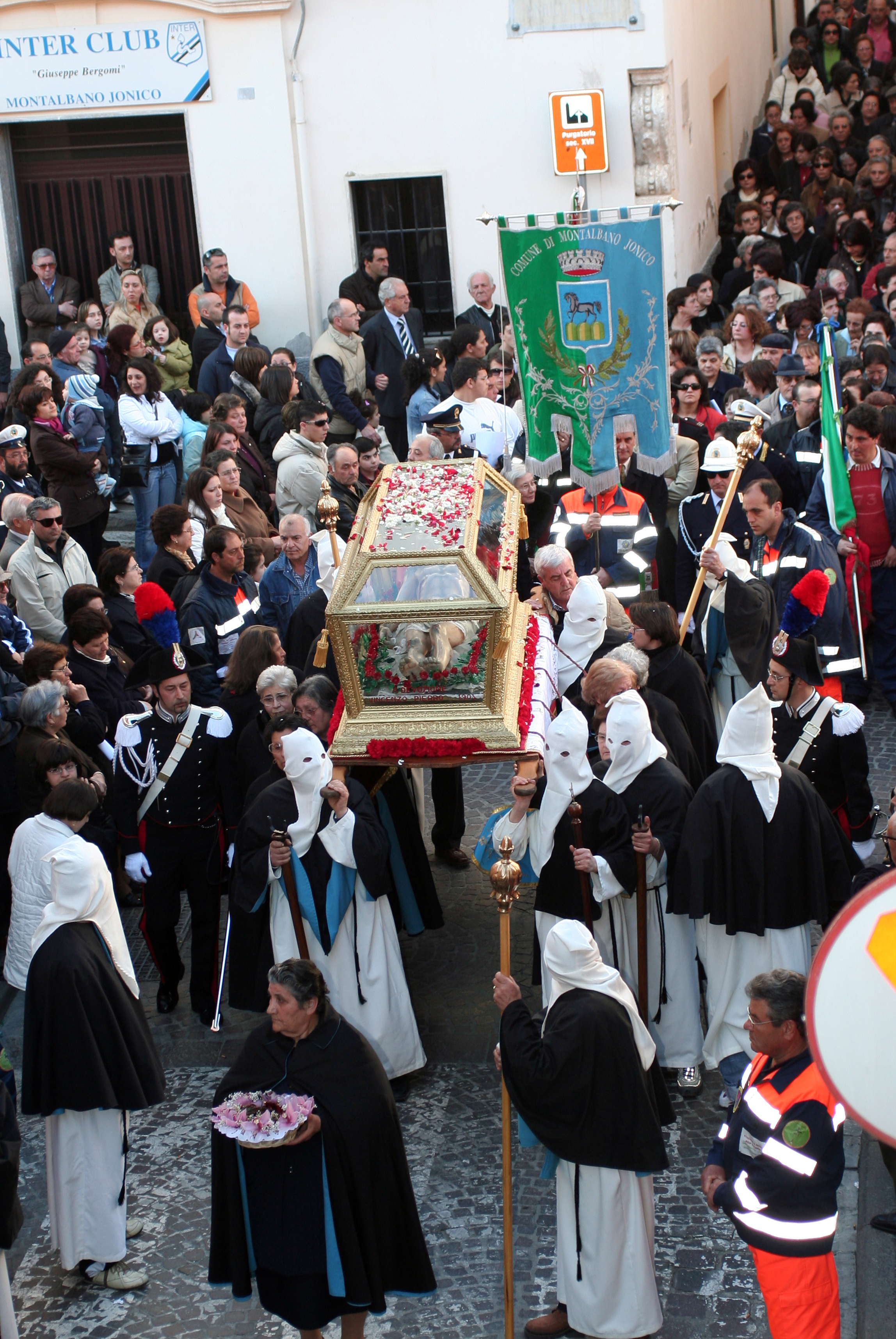 Processione del Venerdì santo a Montalbano Jonico